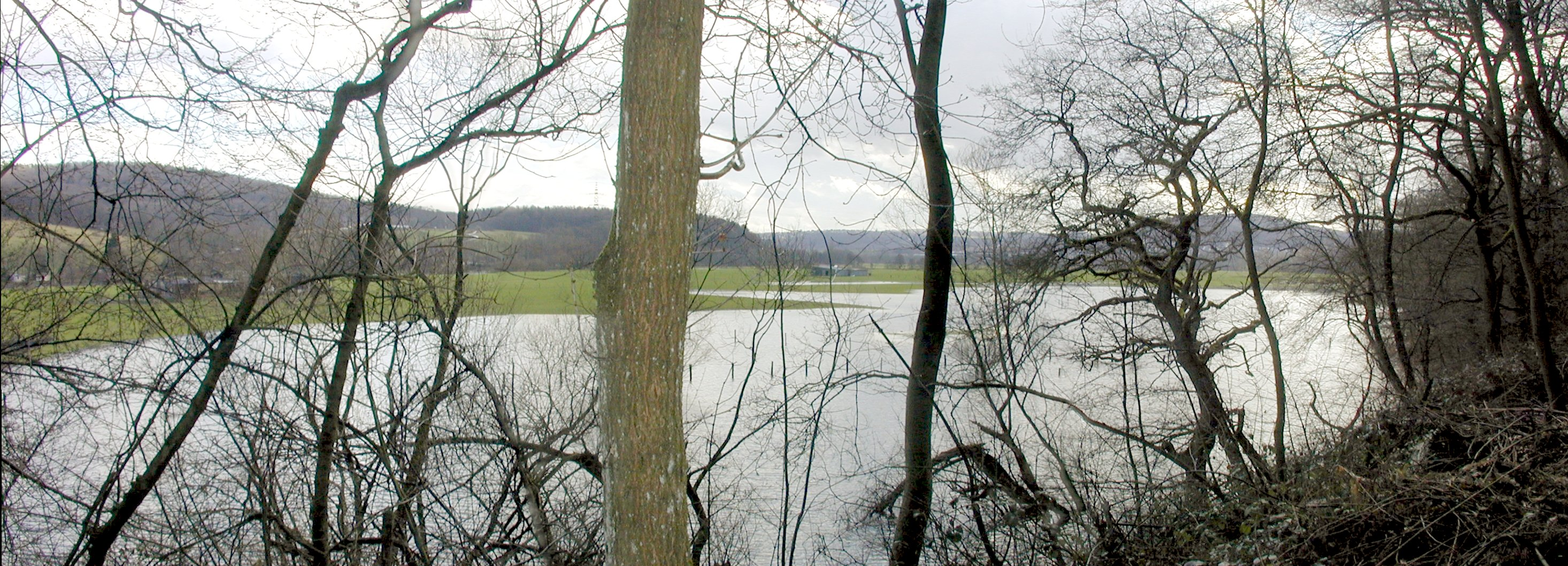 Naturschutzgebiet Ruhraue in Witten bei Hochwasser